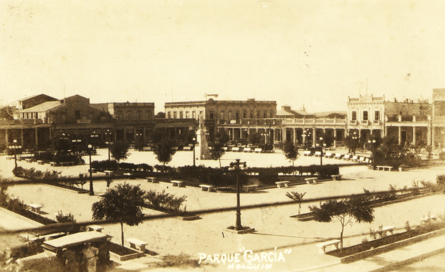 Vista del Parque Calixto García, Tomada en 1918.